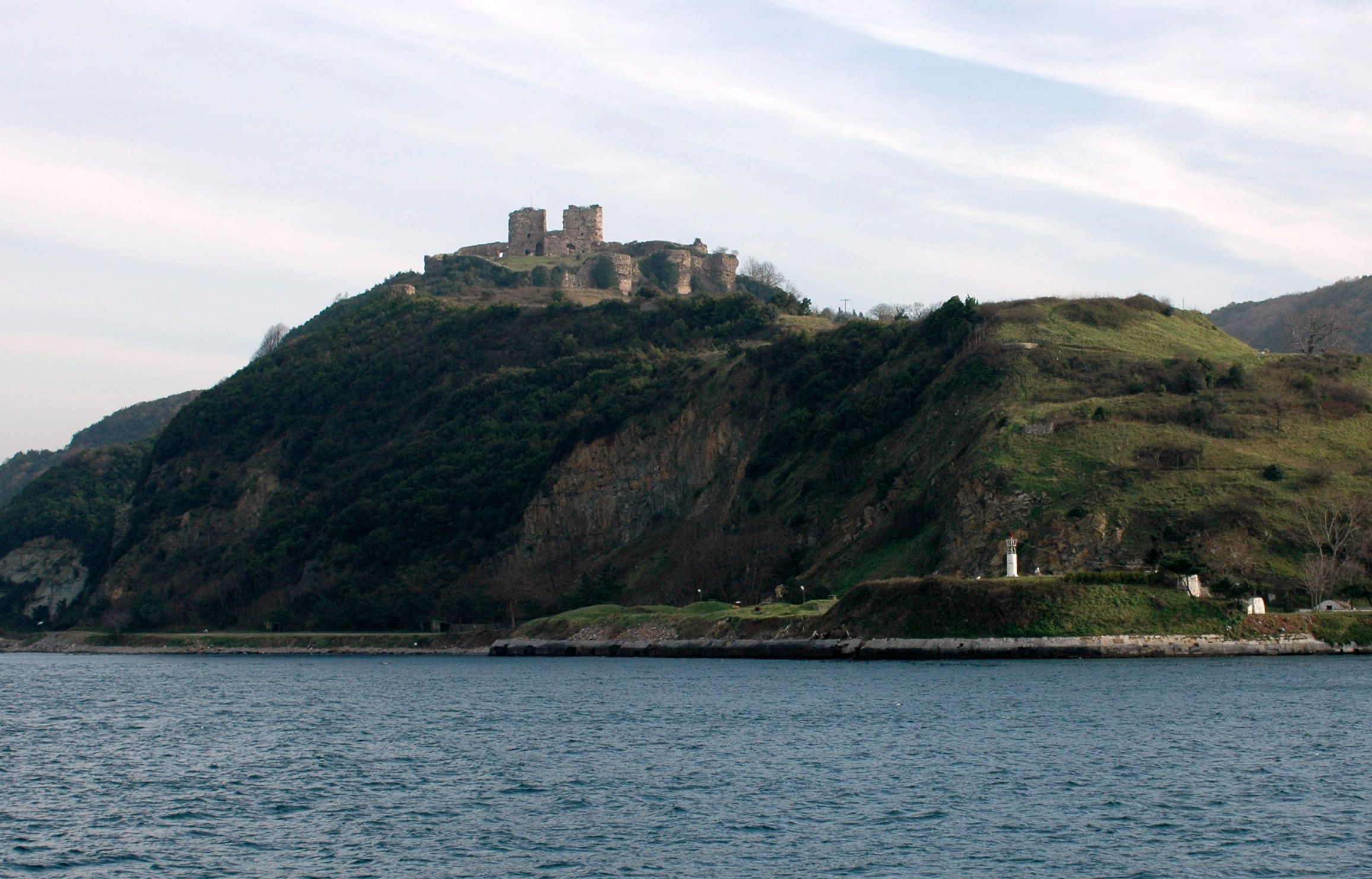 Castell de Yoros